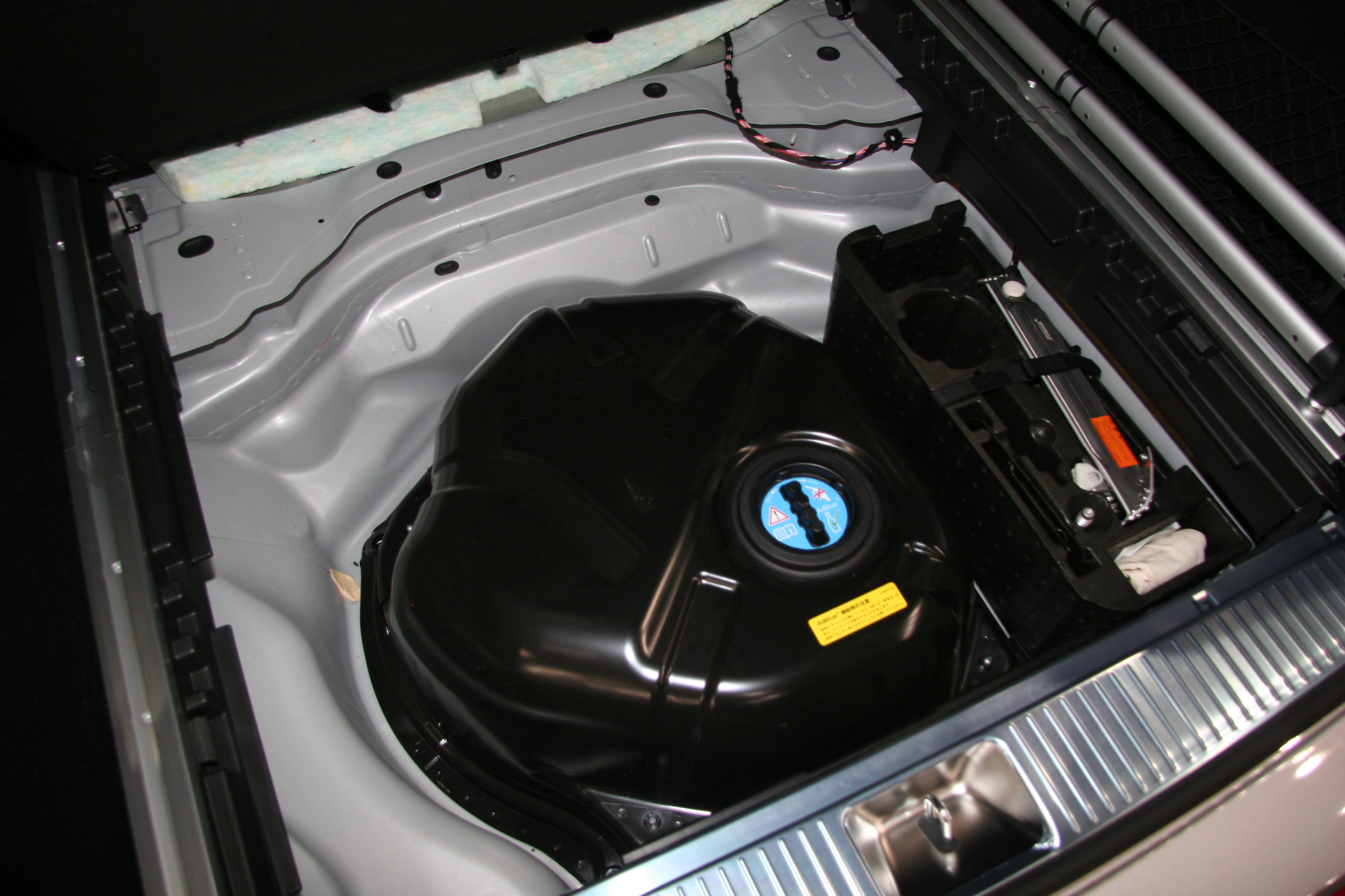 Mercedes-Benz E350 BlueTEC Station Wagon